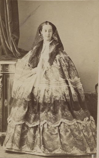 Comtesse Le Hon